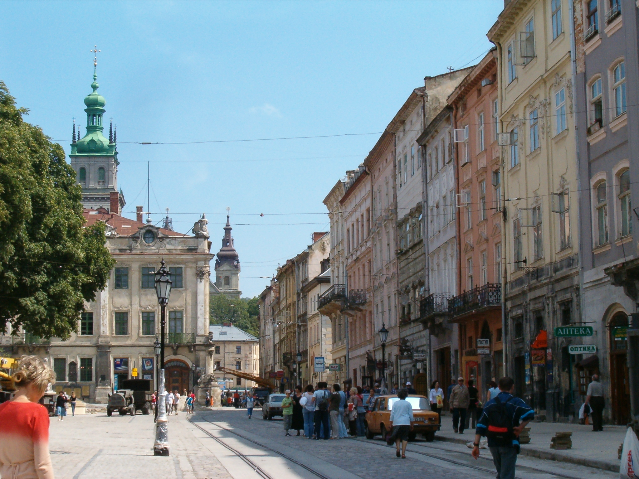 Pierzeja południowa Rynku we Lwowie